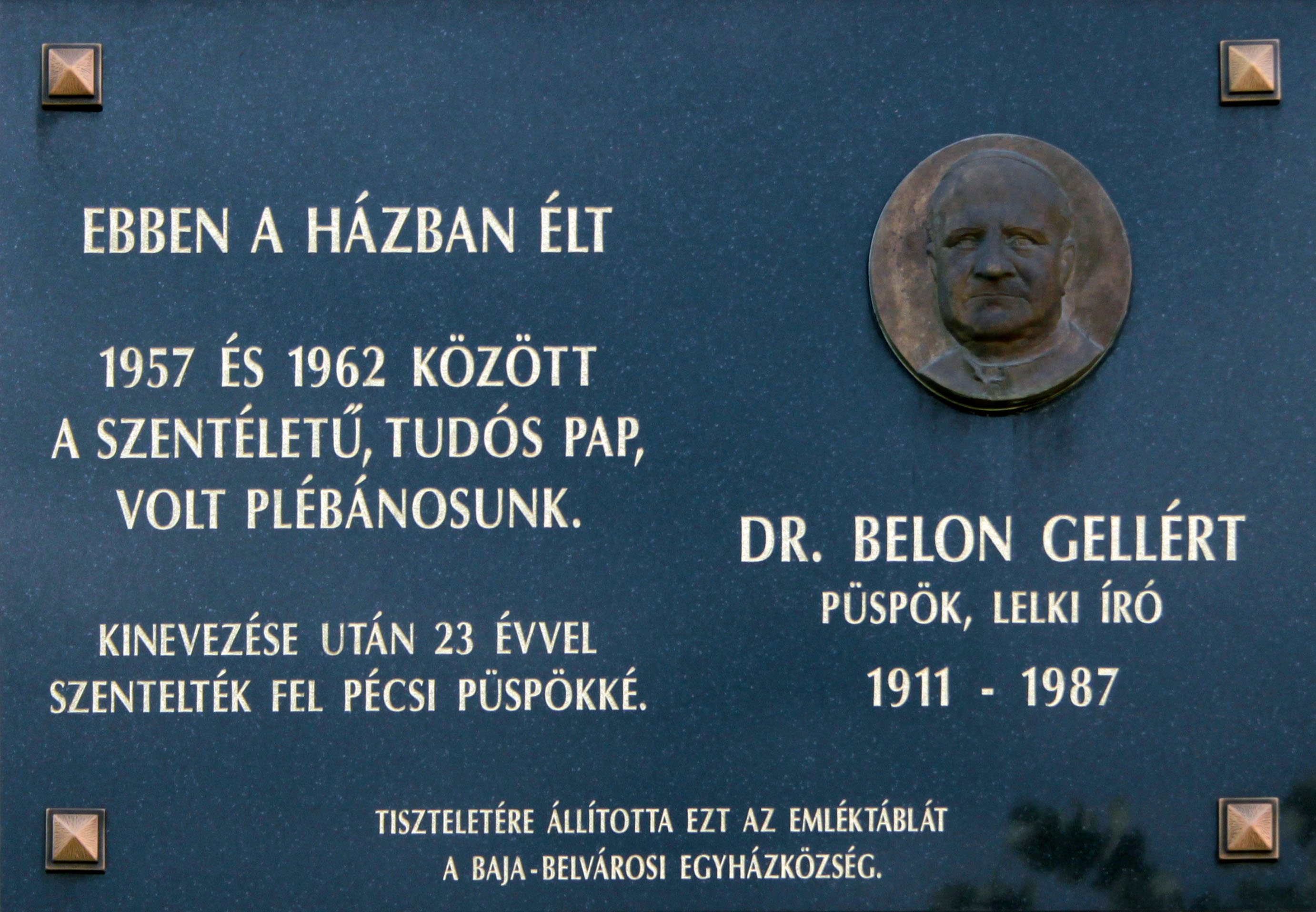 Belon Gellért-emléktábla Baján. A dombormű Harmath István (*1974) alkotása (2005)